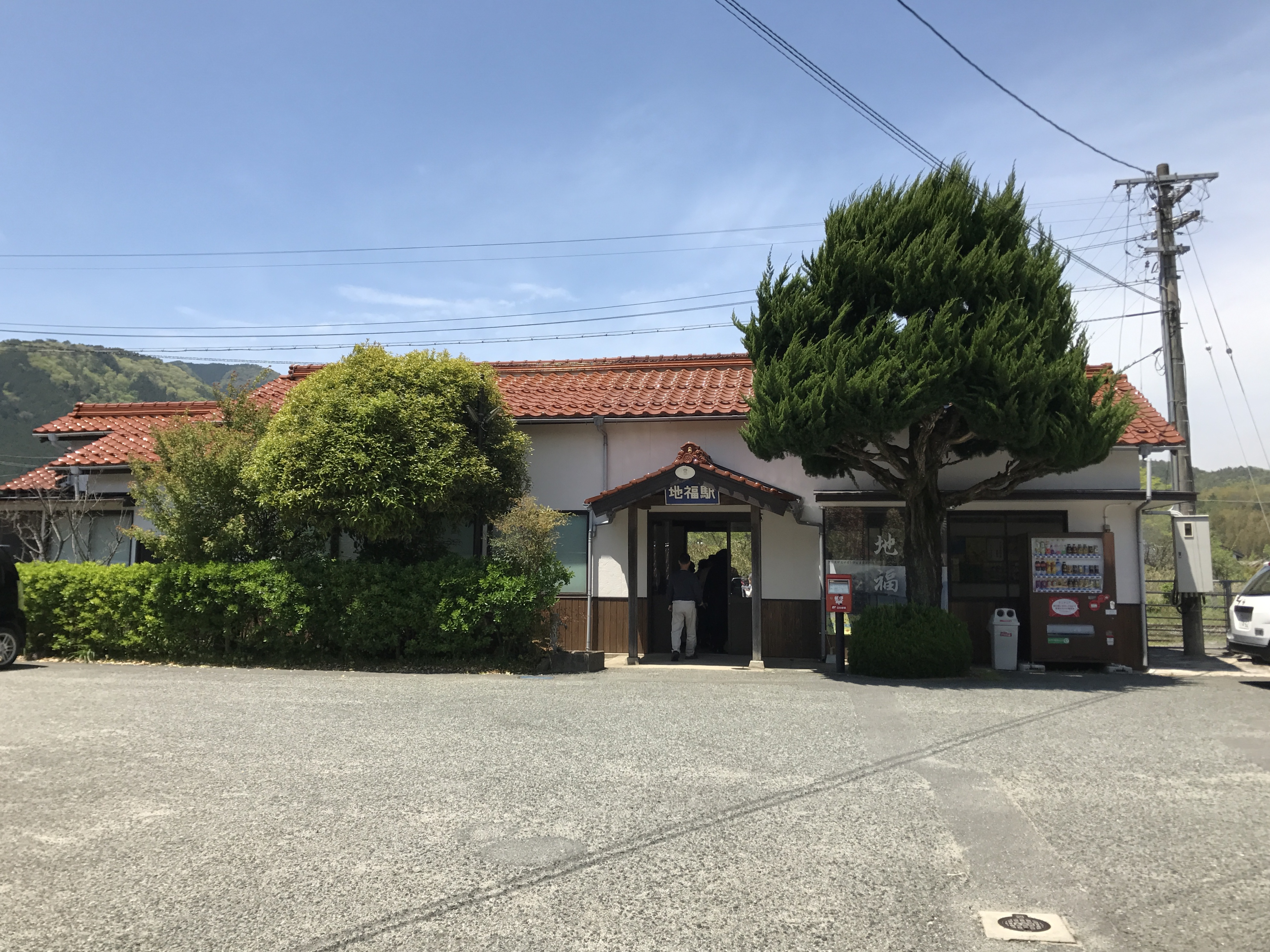 地福駅駅舎